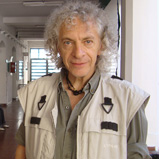 Prof. Raúl Montenegro.